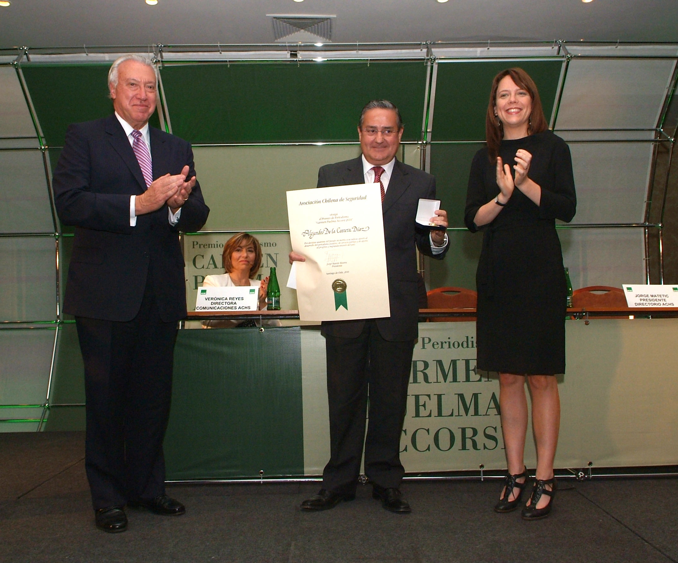 Ministra Secretaria General de Gobierno, Ena von Baer, participa en la entrega del premio al Periodismo,Carmen Puelma, que fue otorgado al Periodista Alejandro de la Carrera. Centro de Eventos Casa Piedra.